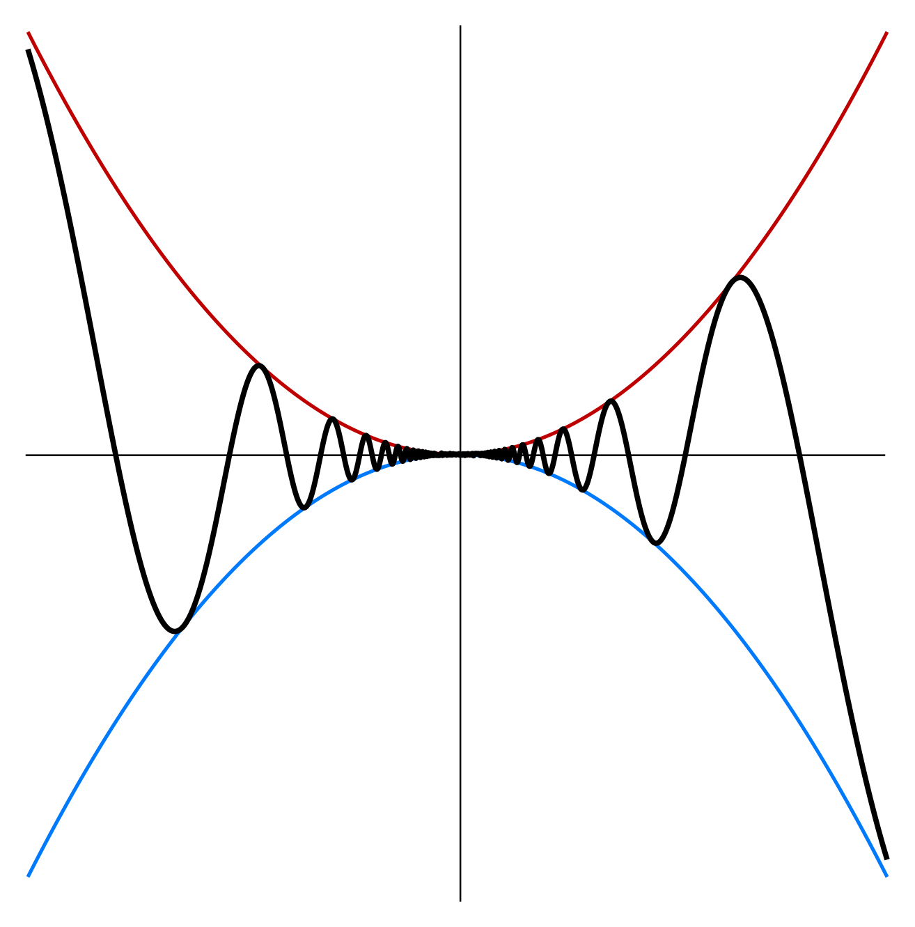 Instängningssatsen